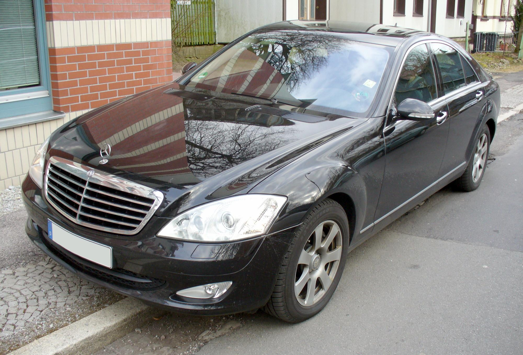 Mercedes-Benz W221